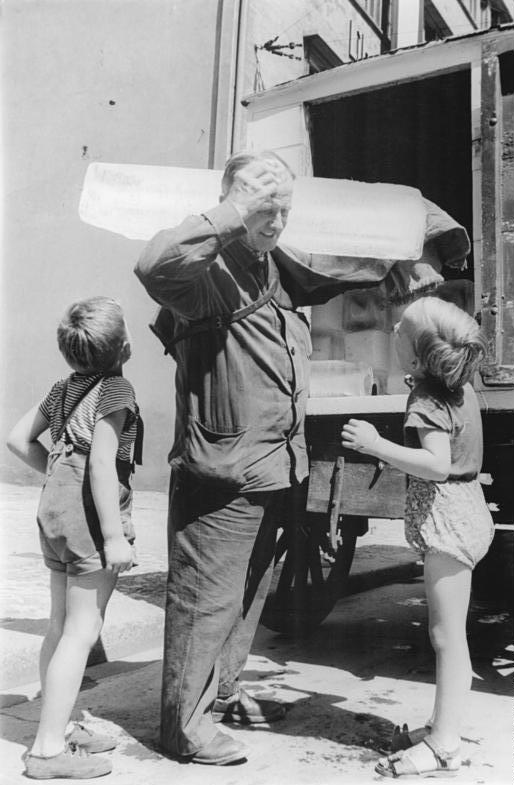 Berlin, Kinder mit dem Eismann Zentralbild Zimontkowski 6.7.1957 Berlin bei 30° im Schatten Sehnsüchtig wird in diesen Tagen in vielen Haushalten und Geschäften der "Eismann" erwartet. Aber auch unsere Kleinen empfangen ihn mit Freuden - ob wohl ein Tropfen abfällt?